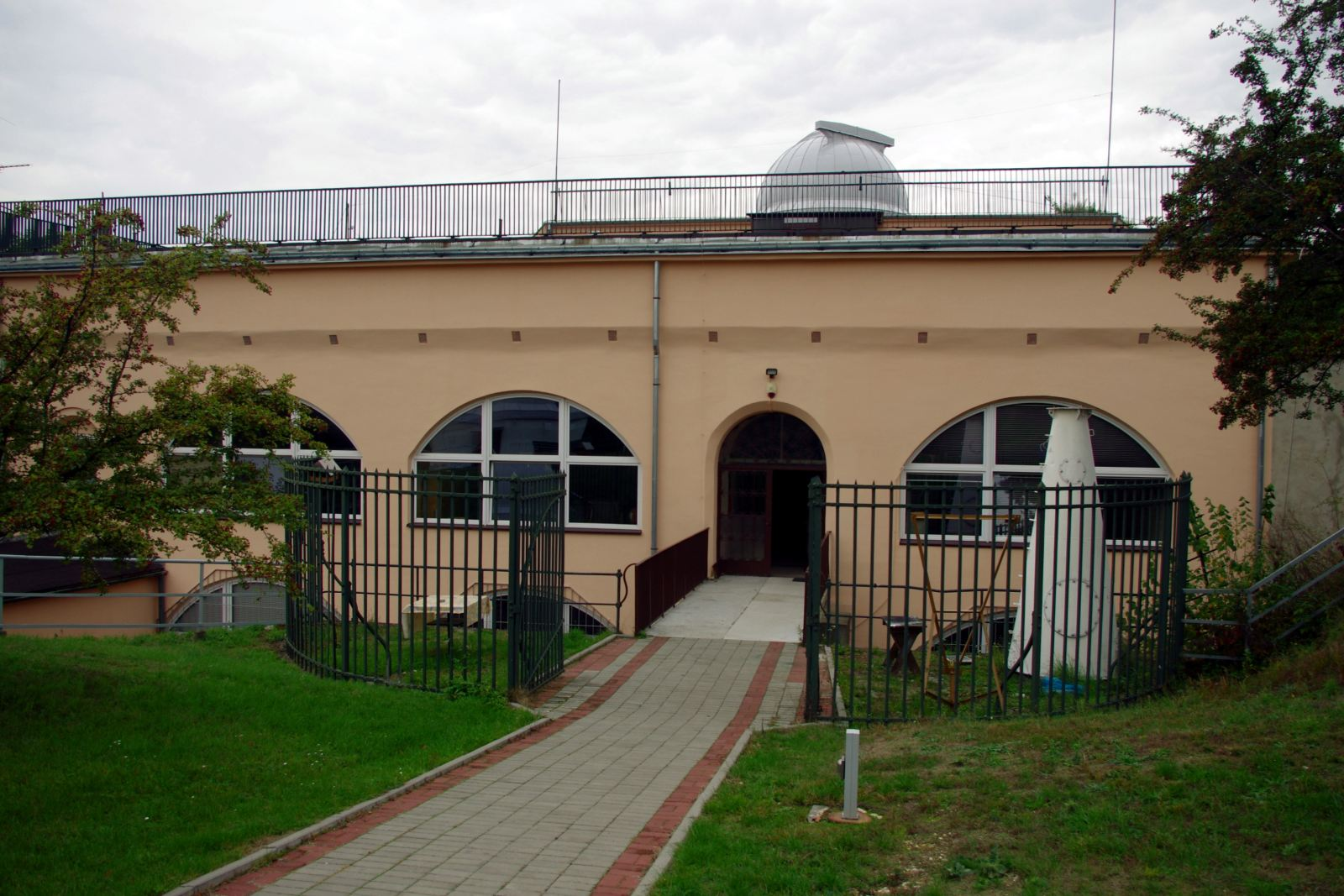 Obserwatorium Astronomiczne Uniwersytetu Jagiellońskiego